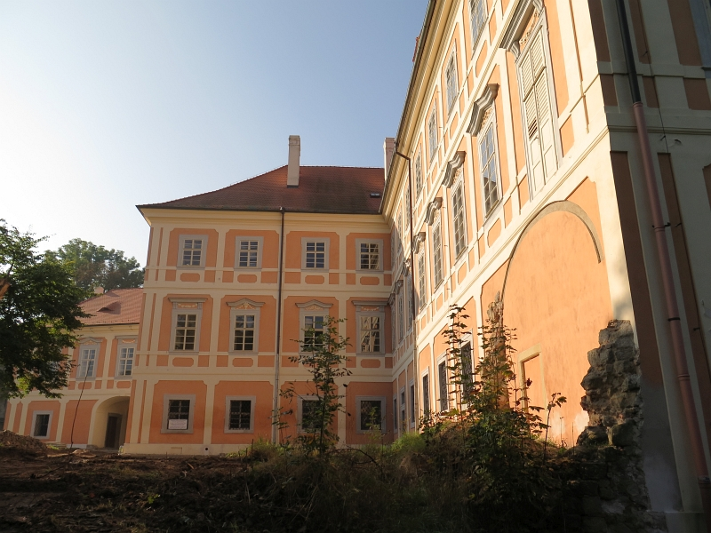 Zámek Březno, Březno 51, Březno (okres Mladá Boleslav).